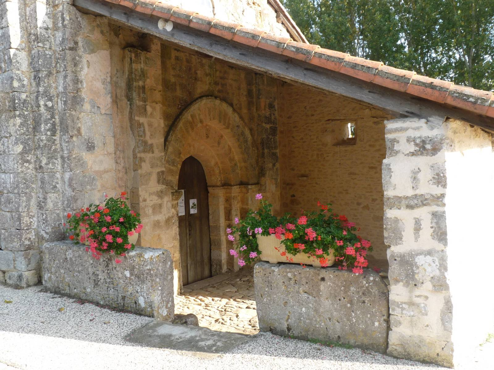 Eglise de St-Gourson, Charente, France